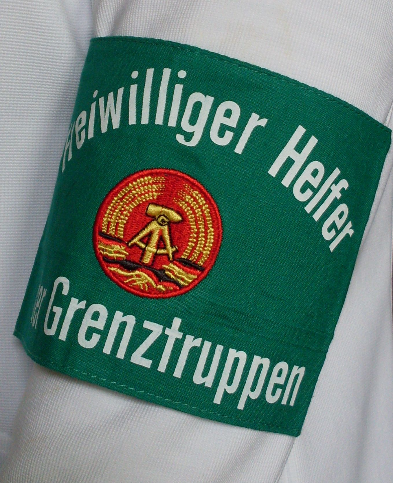 Armbinde freiwiliger Helfer der Grenztruppen